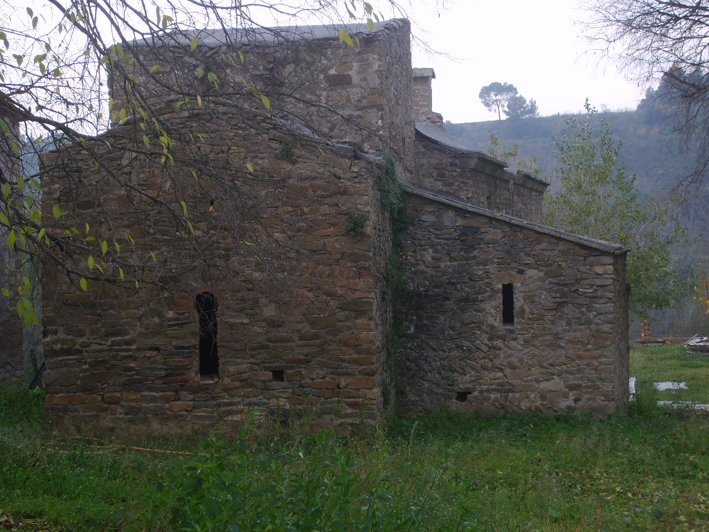 Església de Santa Maria de Matadars (Bages)